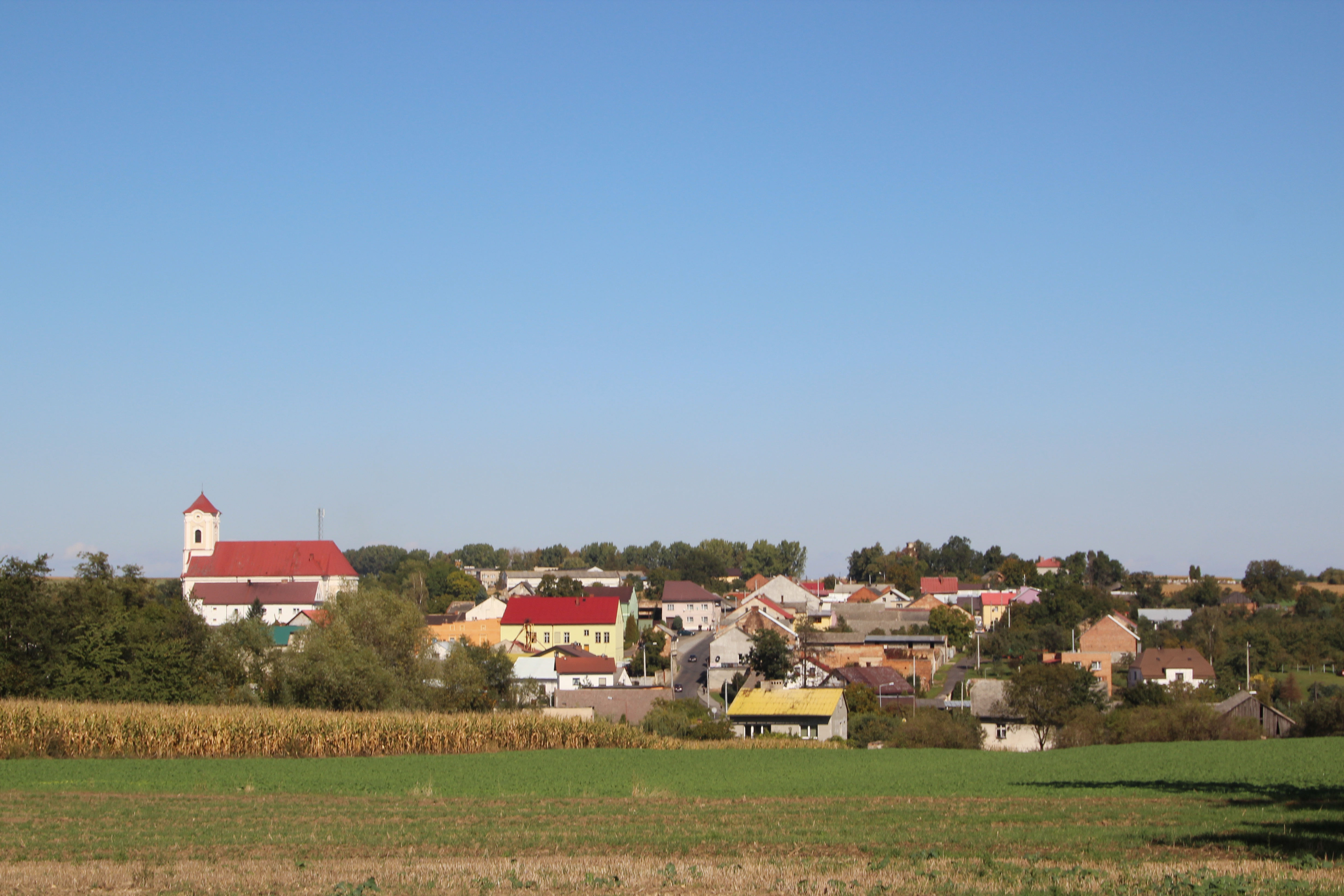 Nowa Cerekwia - kościół parafialny pw. Świętych Piotra i Pawła, 1783-1787